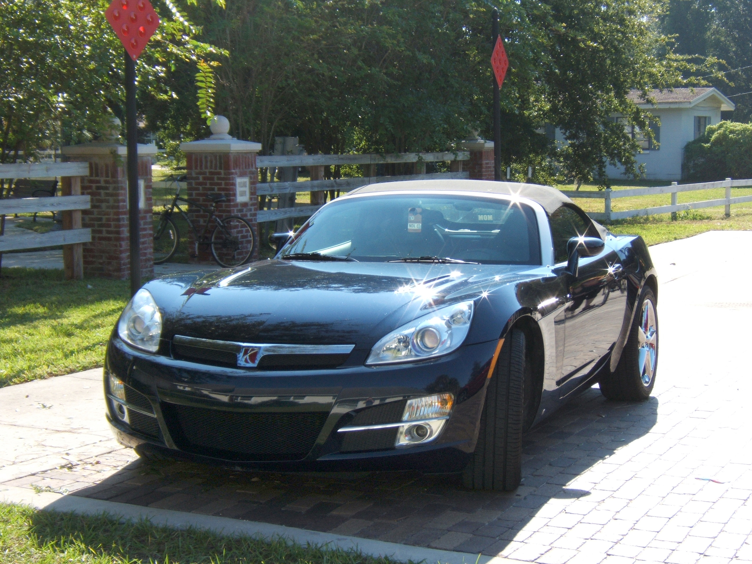 Splendide Saturn Sky (groupe GM oblige, c'est le clone de l'Opel GT de 2007 que l'on trouve en Europe) en Floride.